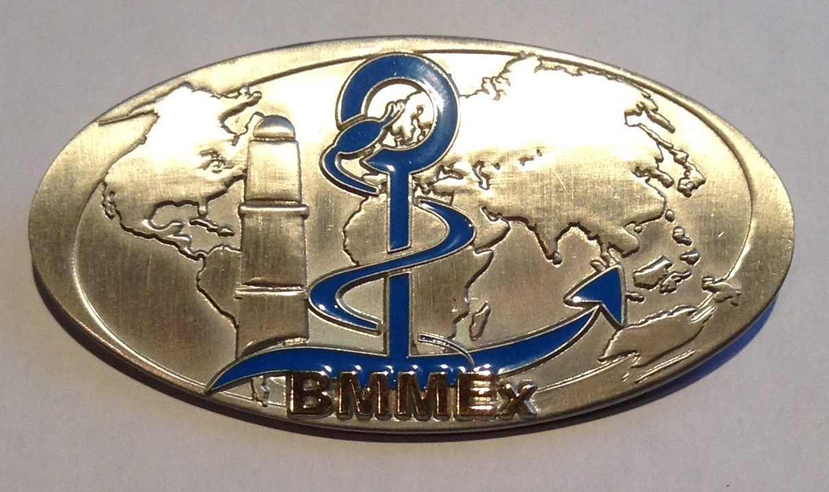 Insigne du BMMEX, dernier brevet remis à l'Ecole du Pharo